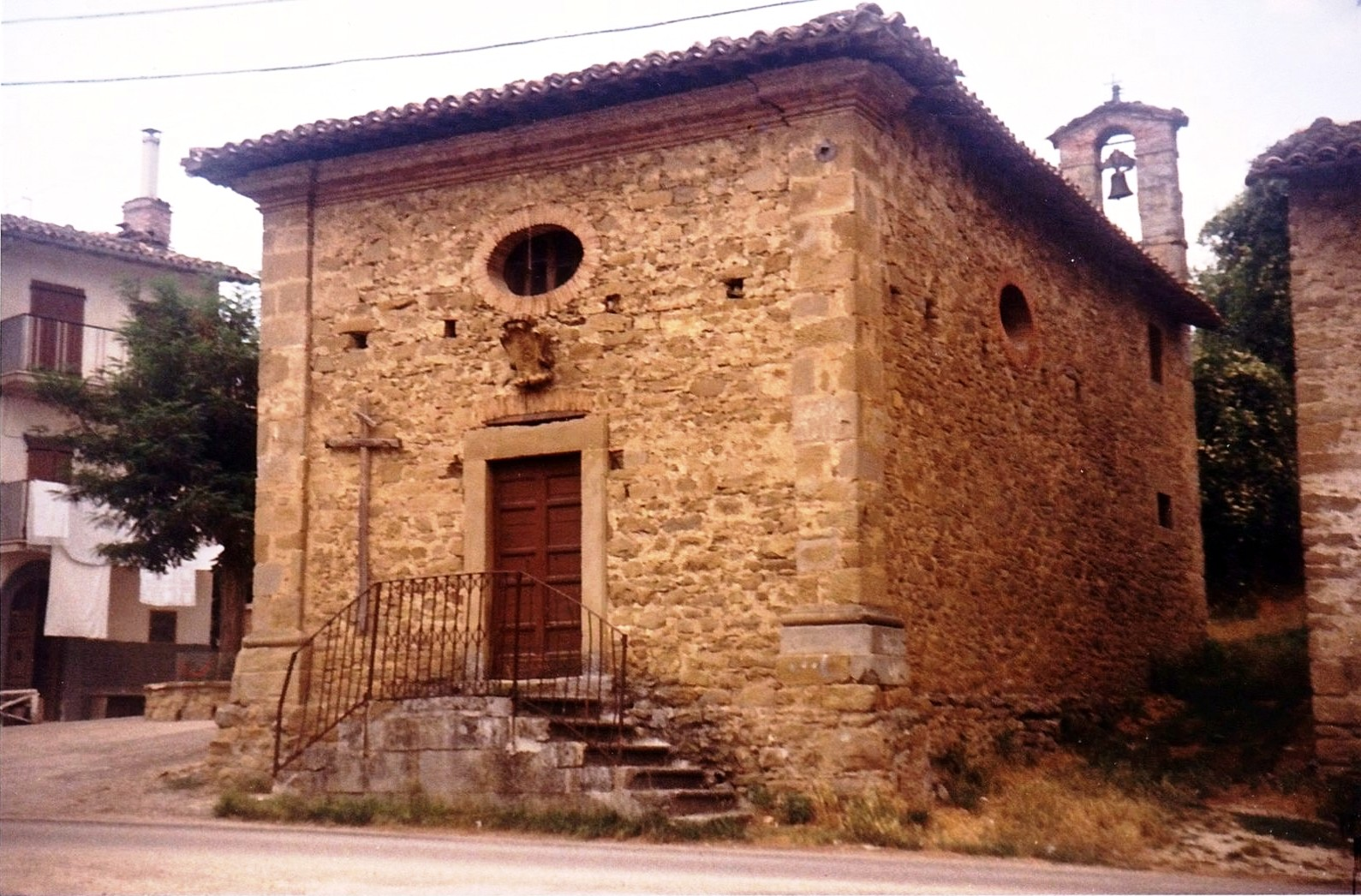 L'Oratorio Madonna di Loreto, piccolo luogo di culto del XVI secolo realizzato dagli Orsini di Amatrice nella Villa di Rio (frazione di Amatrice, provincia di Rieti)